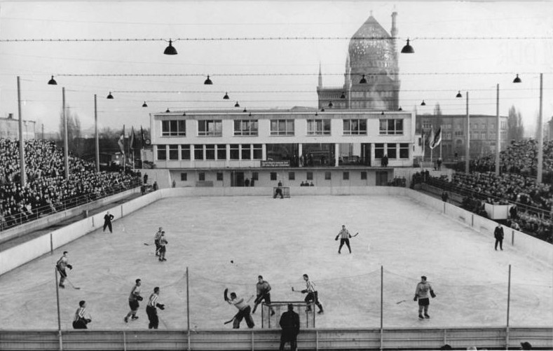 Dresden, Eisstadion, Eishockey Zentralbild Bernat 27.12.1960 Kunsteisstadion in Dresden eröffnet In Dresden wurde am 26.12.1960 das möglicherweise 6.(siehe Diskussion) Kunsteisstadion in der DDR eröffnet. Die Anlage faßt 10000 Zuschauer und am 6. Januar 1961 wird dort das erste Länderspiel DDR gegen Norwegen ausgetragen. UBz: Anlässlich der Eröffnung spielten eine Bezirksauswahl Dresden gegen den ASK Vorwärts Erfurt.